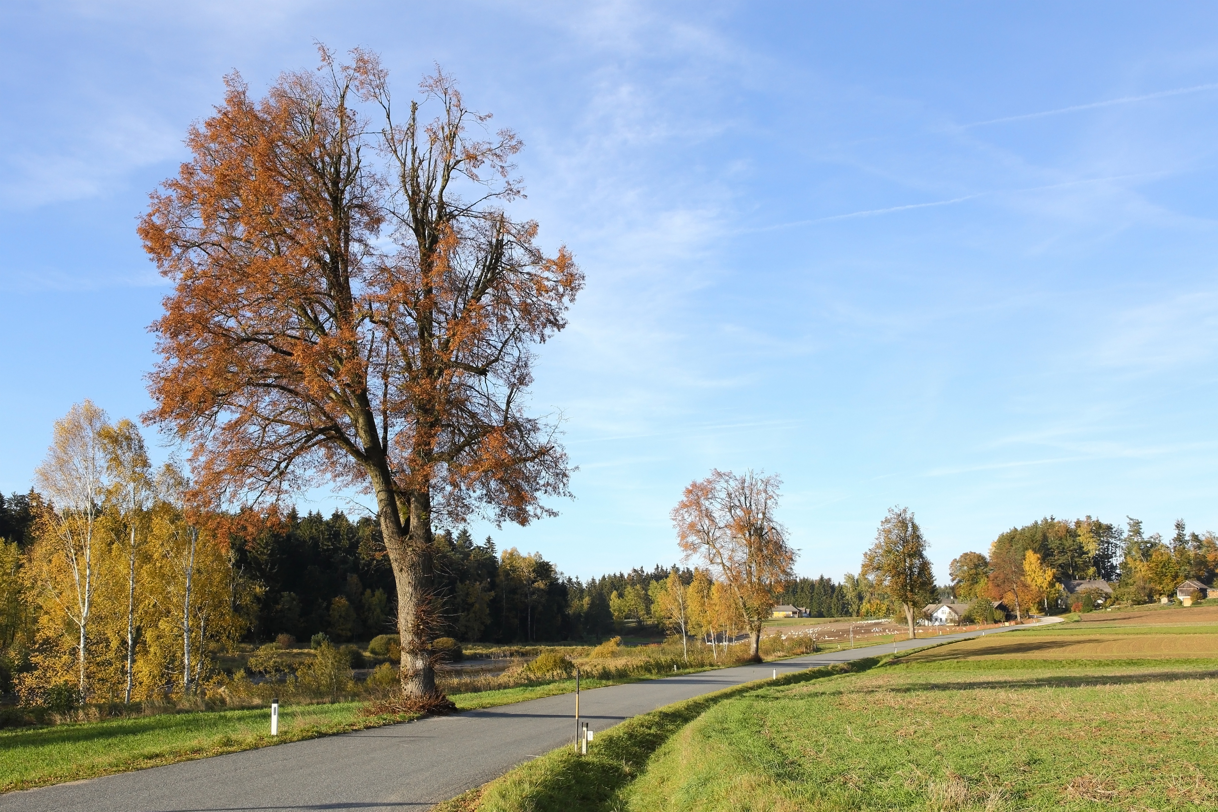 Die aus Linden und Eschen bestehende Allee nördlich von Eggern wurde 1990 zum Naturdenkmal erklärt. This media shows the natural monument in Lower Austria with the ID GD-120.